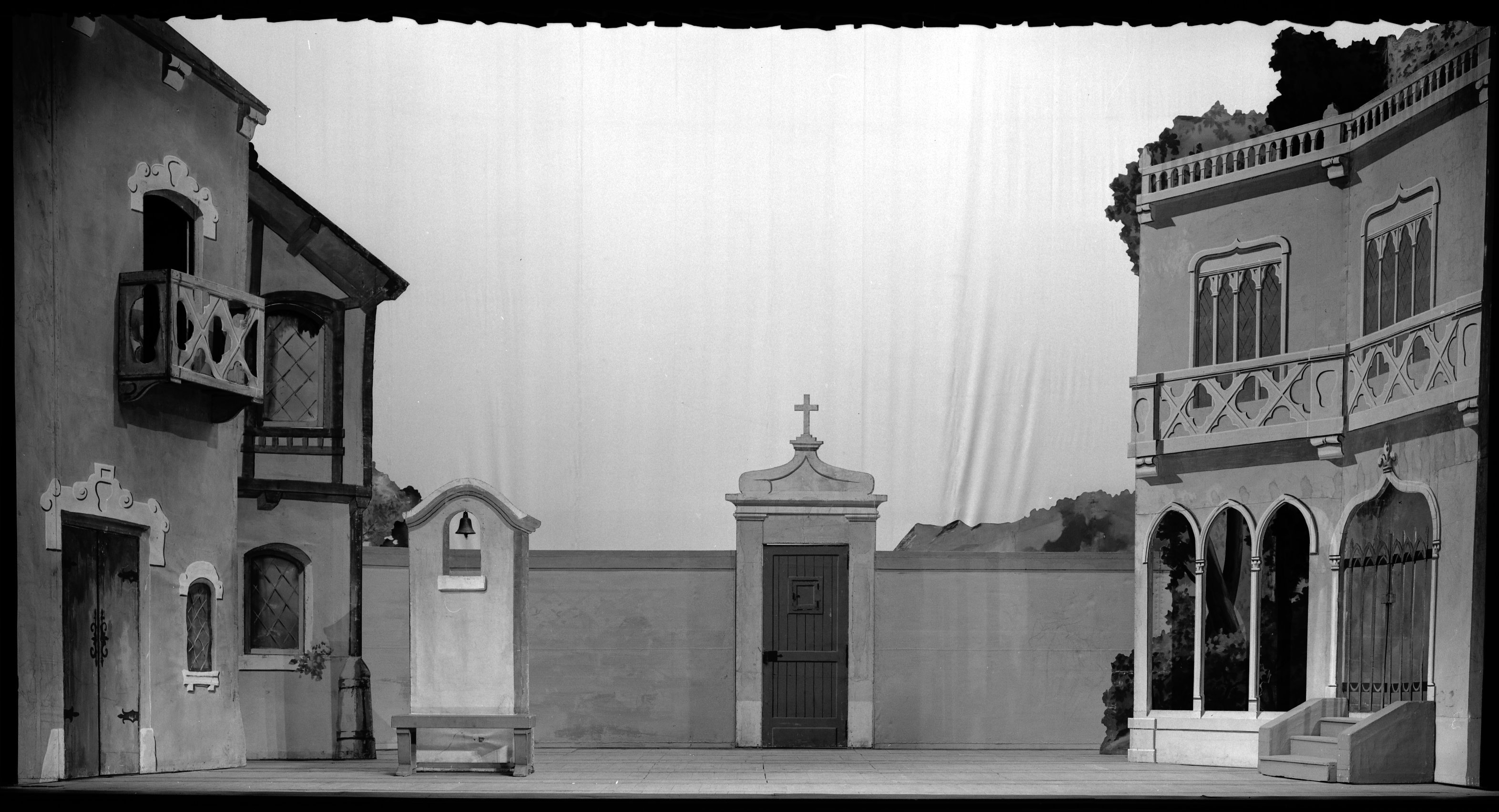 Théâtre du Capitole. Le 28 Mars 1968. Vue du décor des Mousquetaires au couvent au théâtre du Capitole.